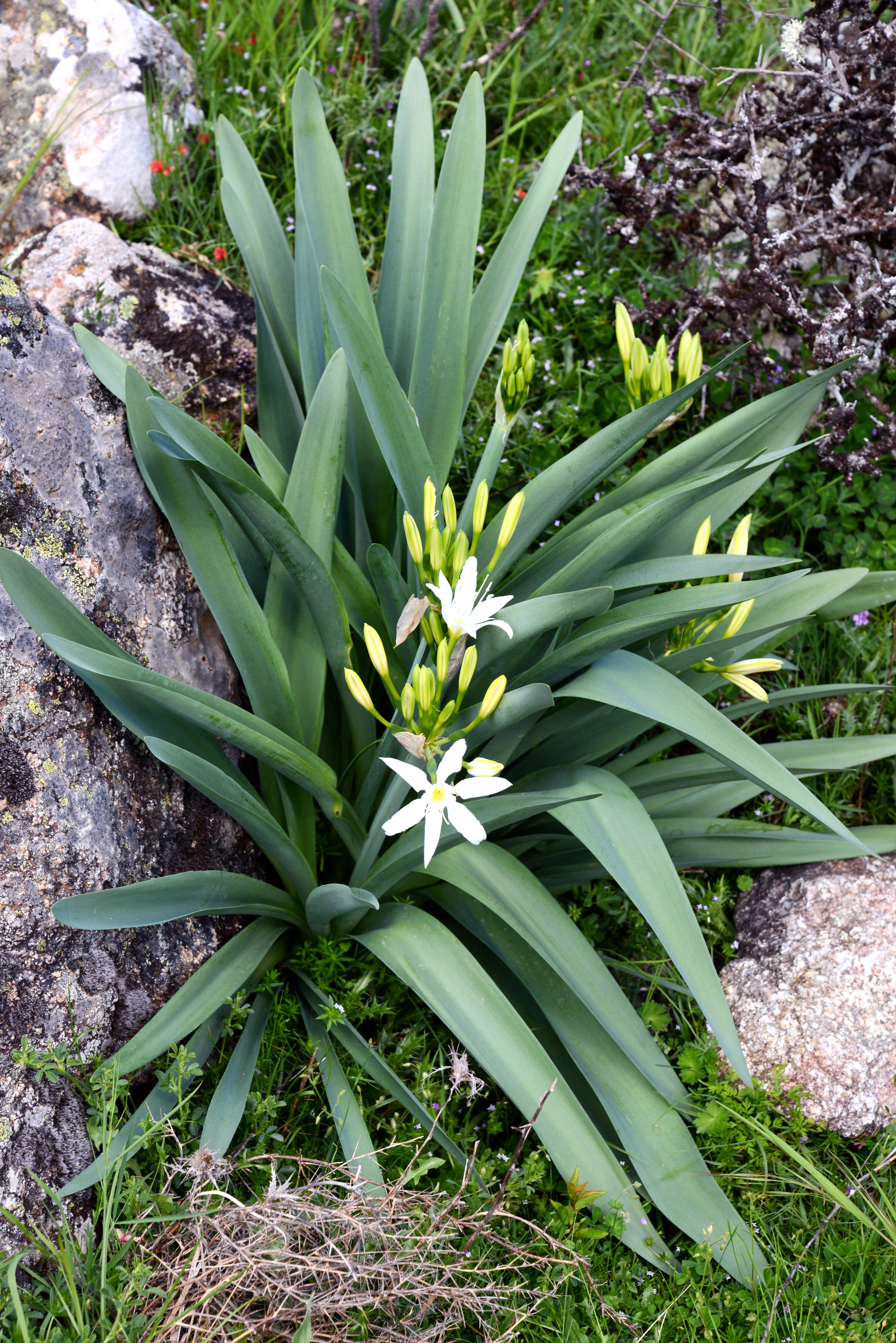 Albertacce, Niolo (Corse) - Pancrace d'Illirium (Pancratium illyricum) dans la forêt communale